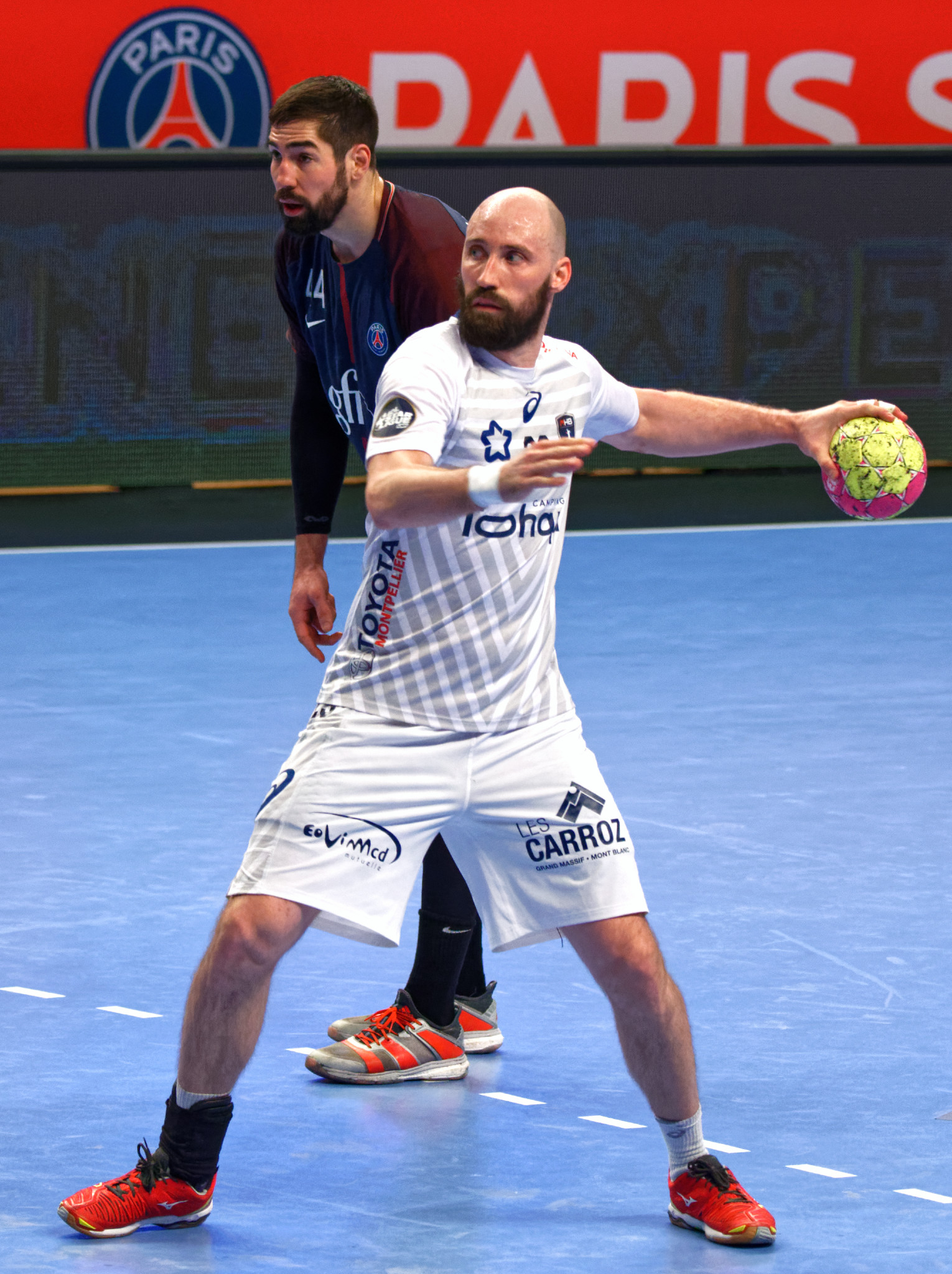 Rencontre de championnat entre le PSG et Montpellier. A Coubertin, le 1er mars 2018.